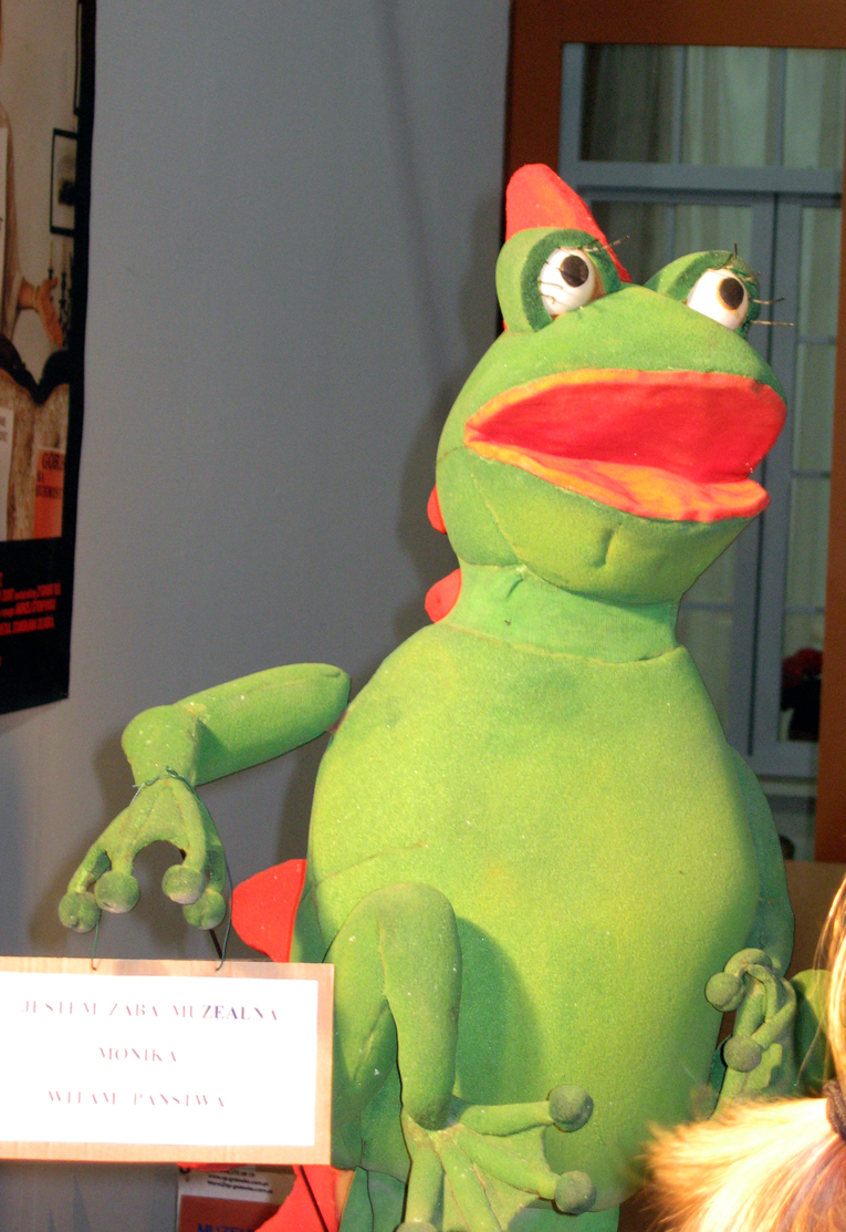 Żaba Monika (kukiełka z popularnych dla dzieci programów telewizyjnych, np. Teleferie, Ciuchcia, Wyprawy profesora Ciekawskiego) - w muzeum TVP )